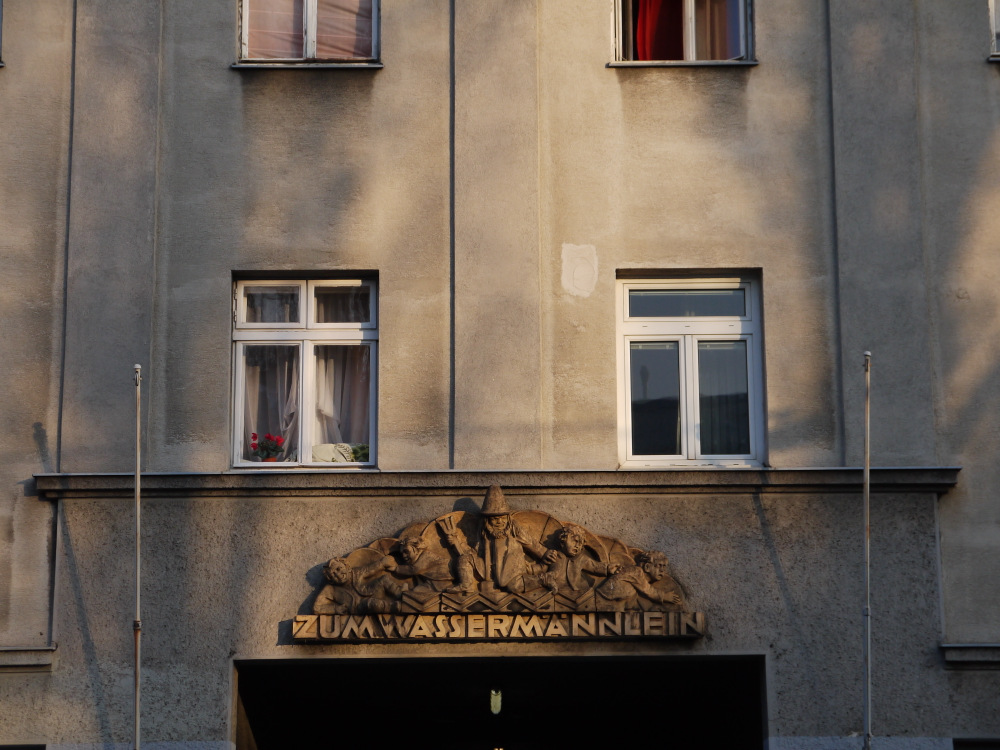 Wassermännlein Rechte Wienzeile 71